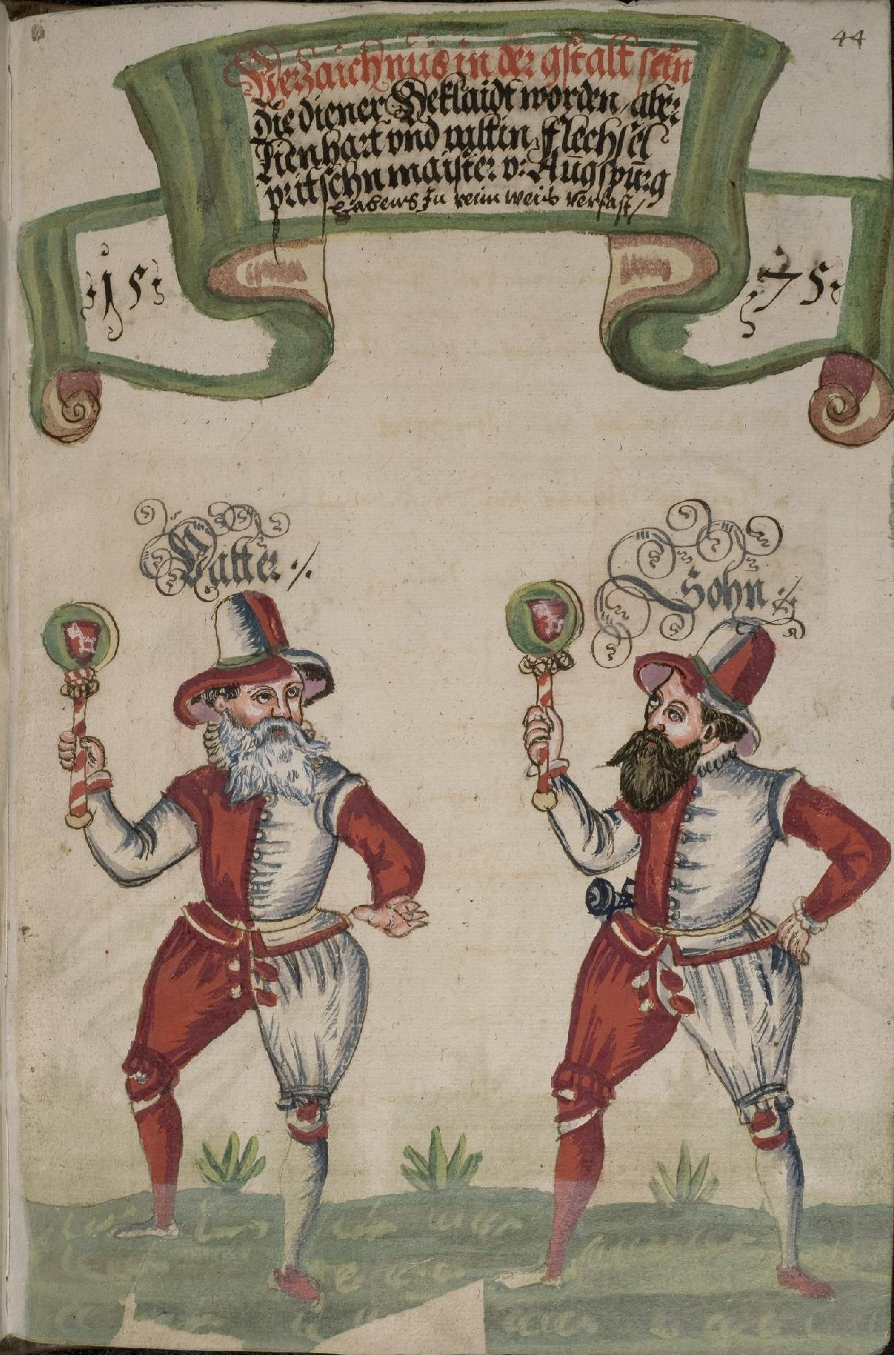 Vater und Sohn Flexel als Pritschenmeister in der Handschrift: Reimspruch auf das Armbrust- und Büchsenschießen in Worms 1575. Worms, um 1575. Seite: 44r. Cod. Pal. germ. 405